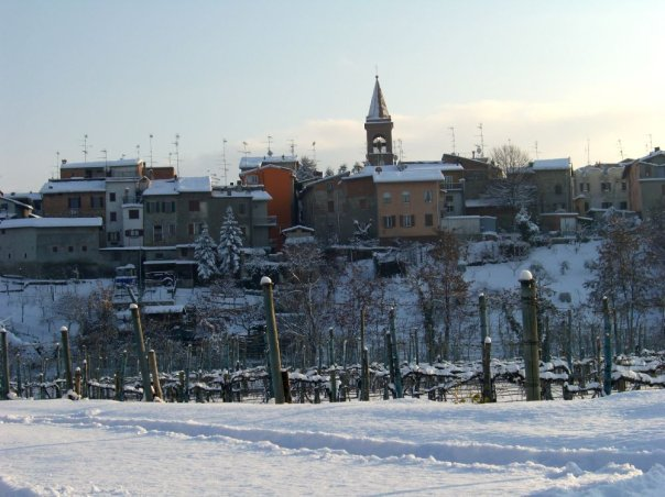 San Michele dei Mucchietti in Inverno. Foto scattata dalla Zona chiamata "Bacino"